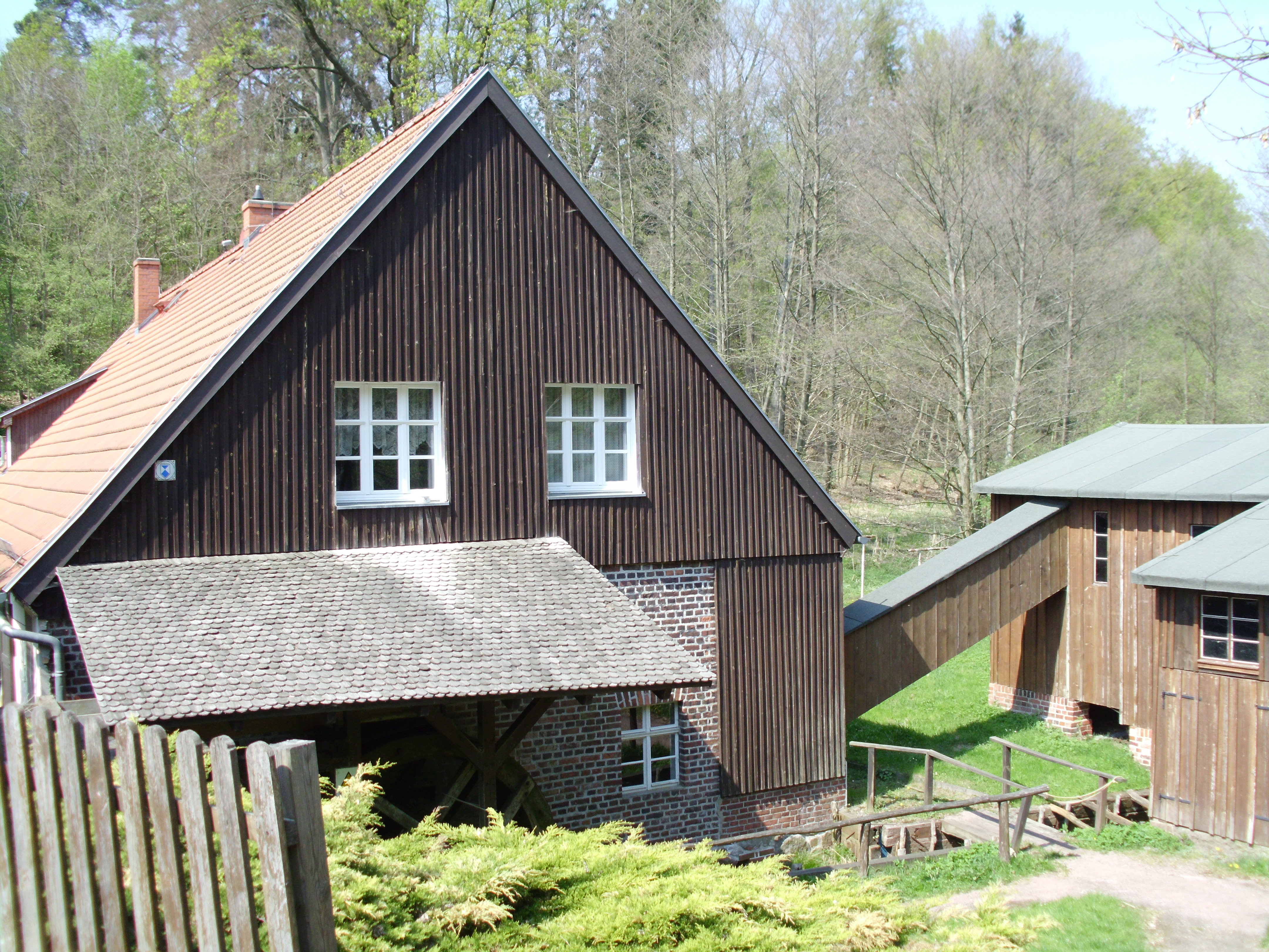 Schwerzkoer Mühle bei Schwerzko, Neuzelle, Naturpark Schlaubetal, Brandenburg, Deutschland